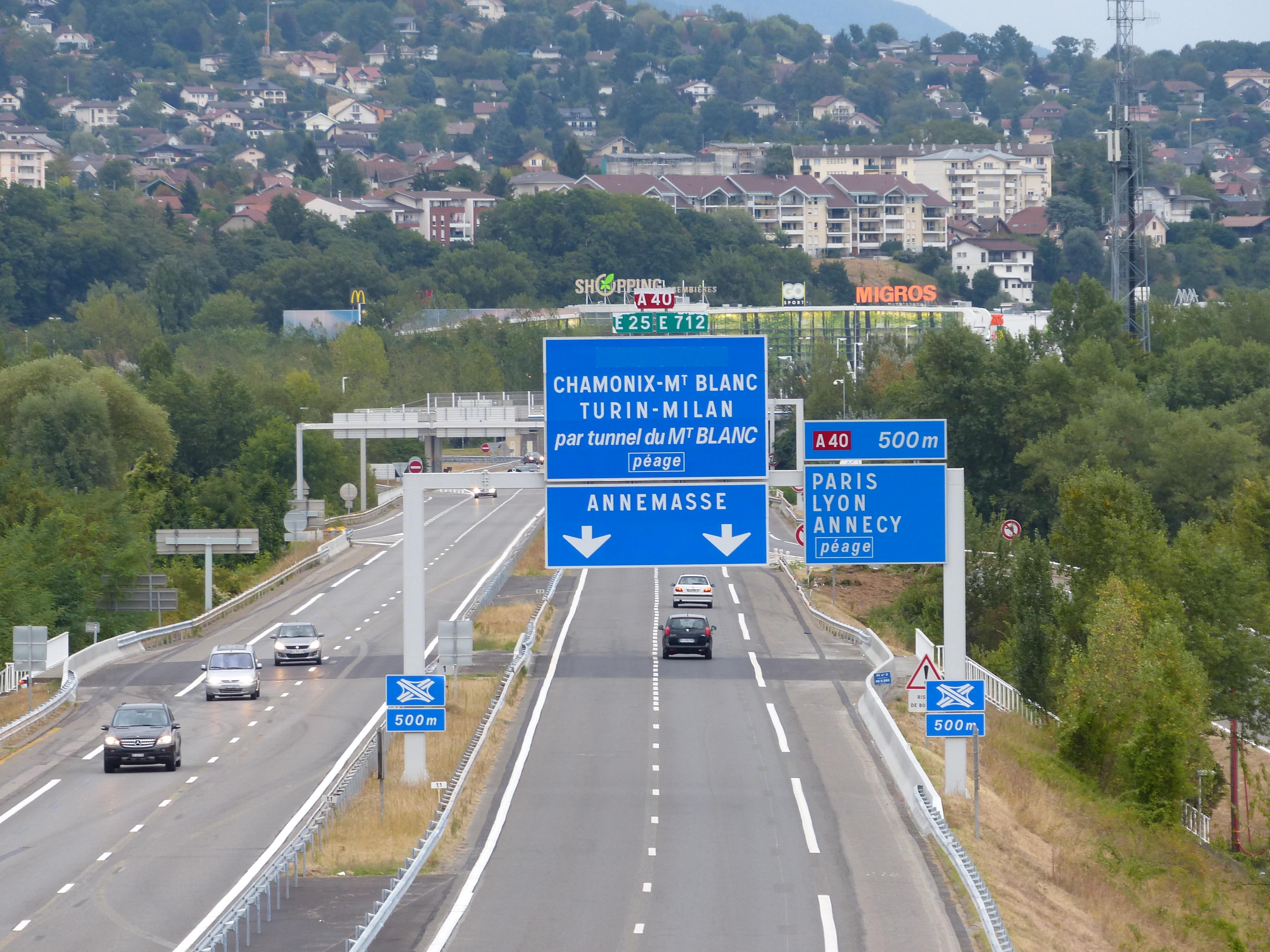 Panneaux D62c, D41c et D74b, sur l'A411 à Gaillard, Haute-Savoie.